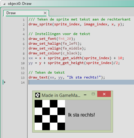 Een voorbeeld van code in het programma GameMaker Studio. Uitvoer is aan de onderkant toegevoegd.